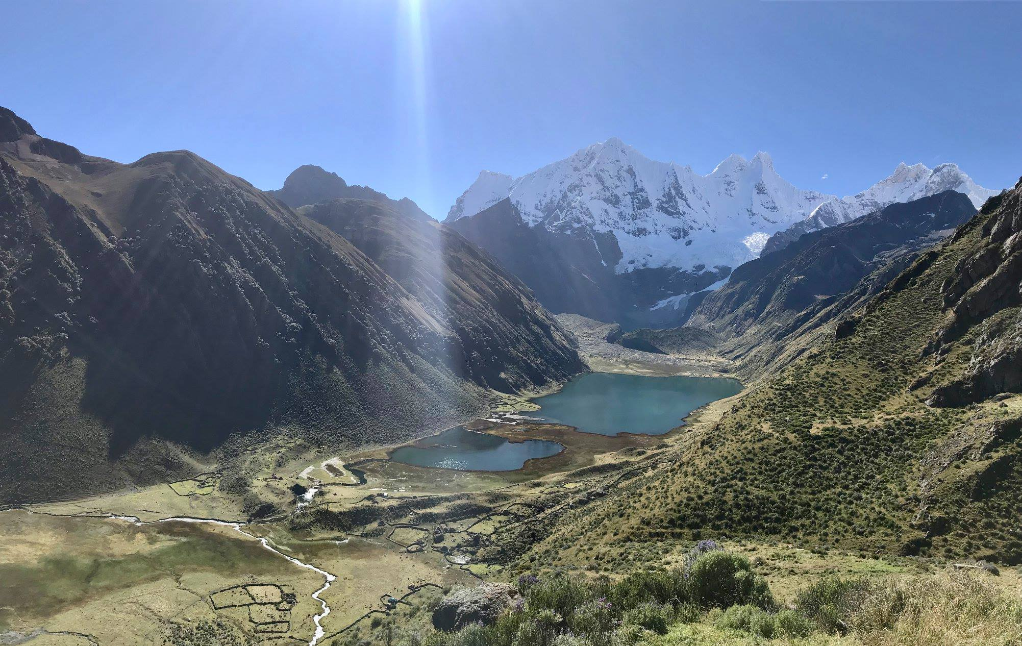 Vista de la laguna Jahuacocha desde el cerro Huacrish, mayo 2018.